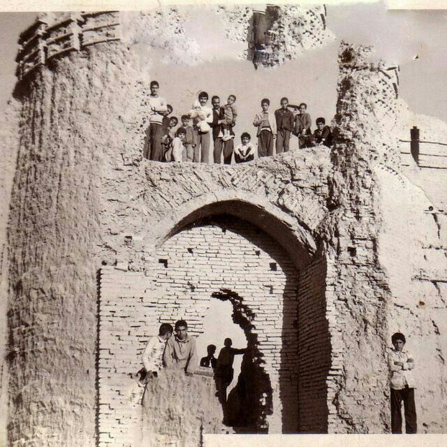 Photo of baroueie castello